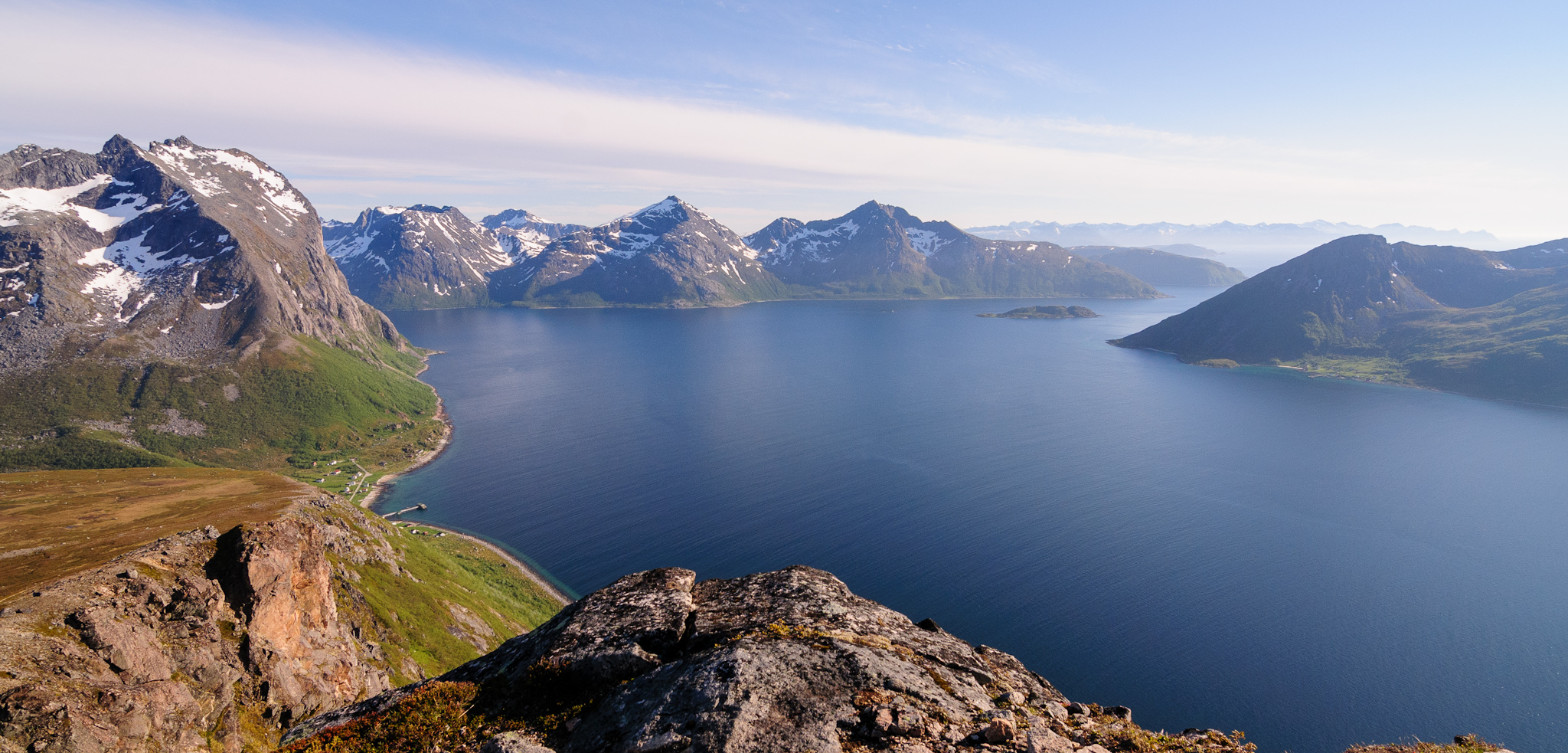 Taken near Brosmetinden